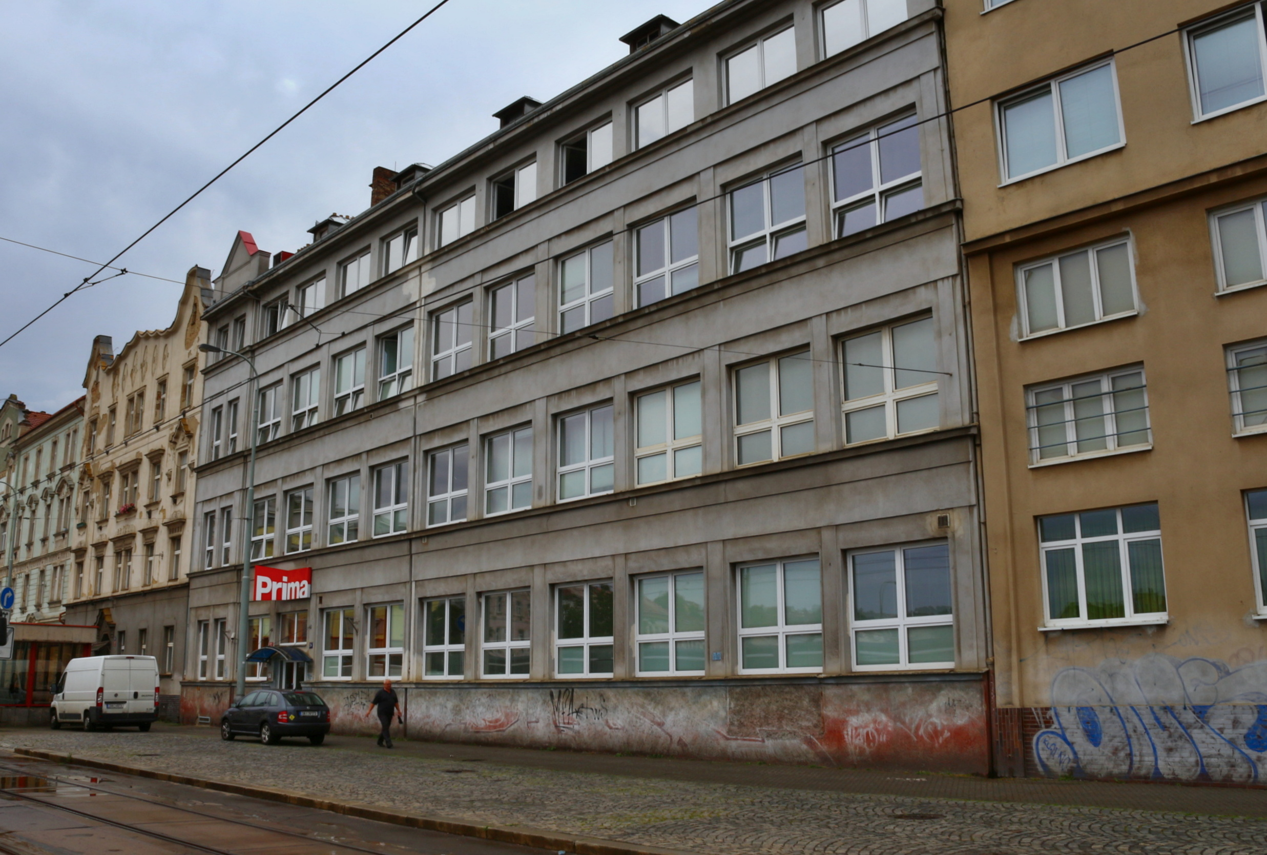 Na žertvách, Libeň